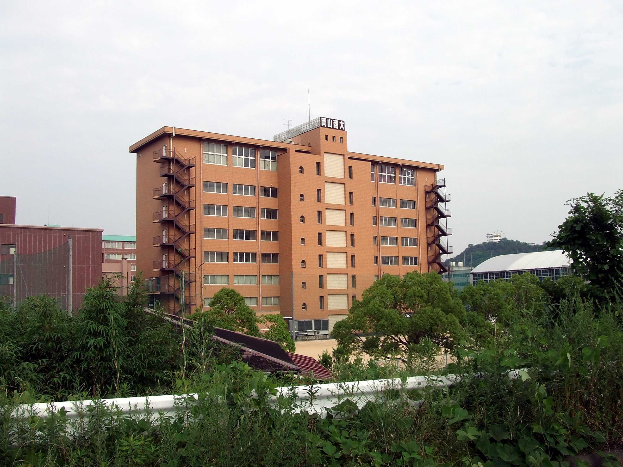 岡山商科大学。岡山県岡山市北区津島京町。2008年7月11日、投稿者本人が撮影。